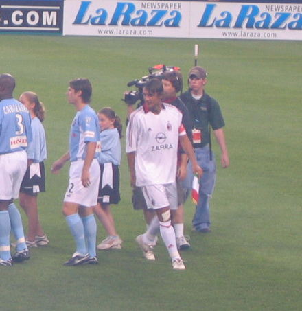 Paolo Maldini